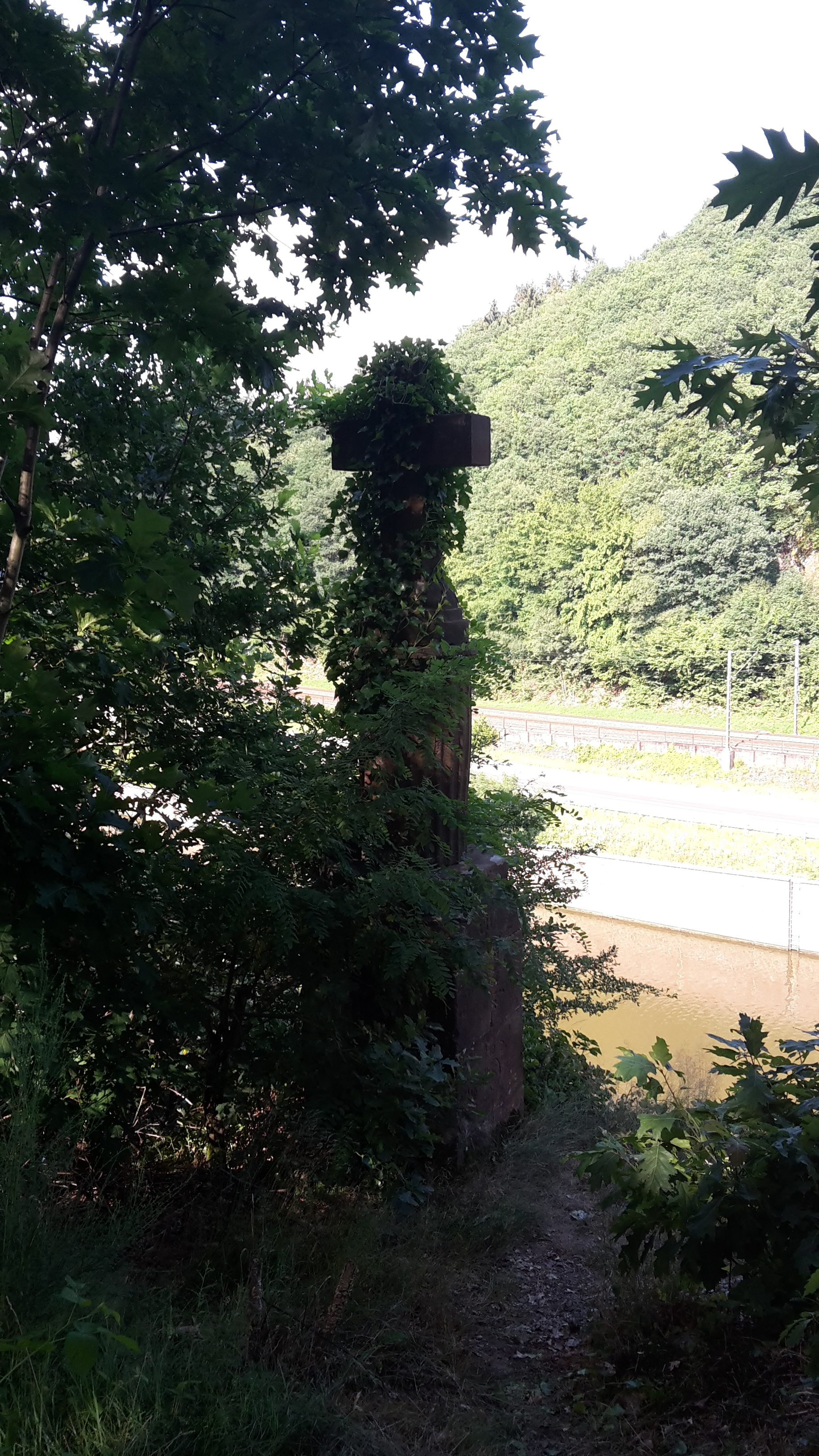 Steinkreuz bei der Lutwinuskapelle